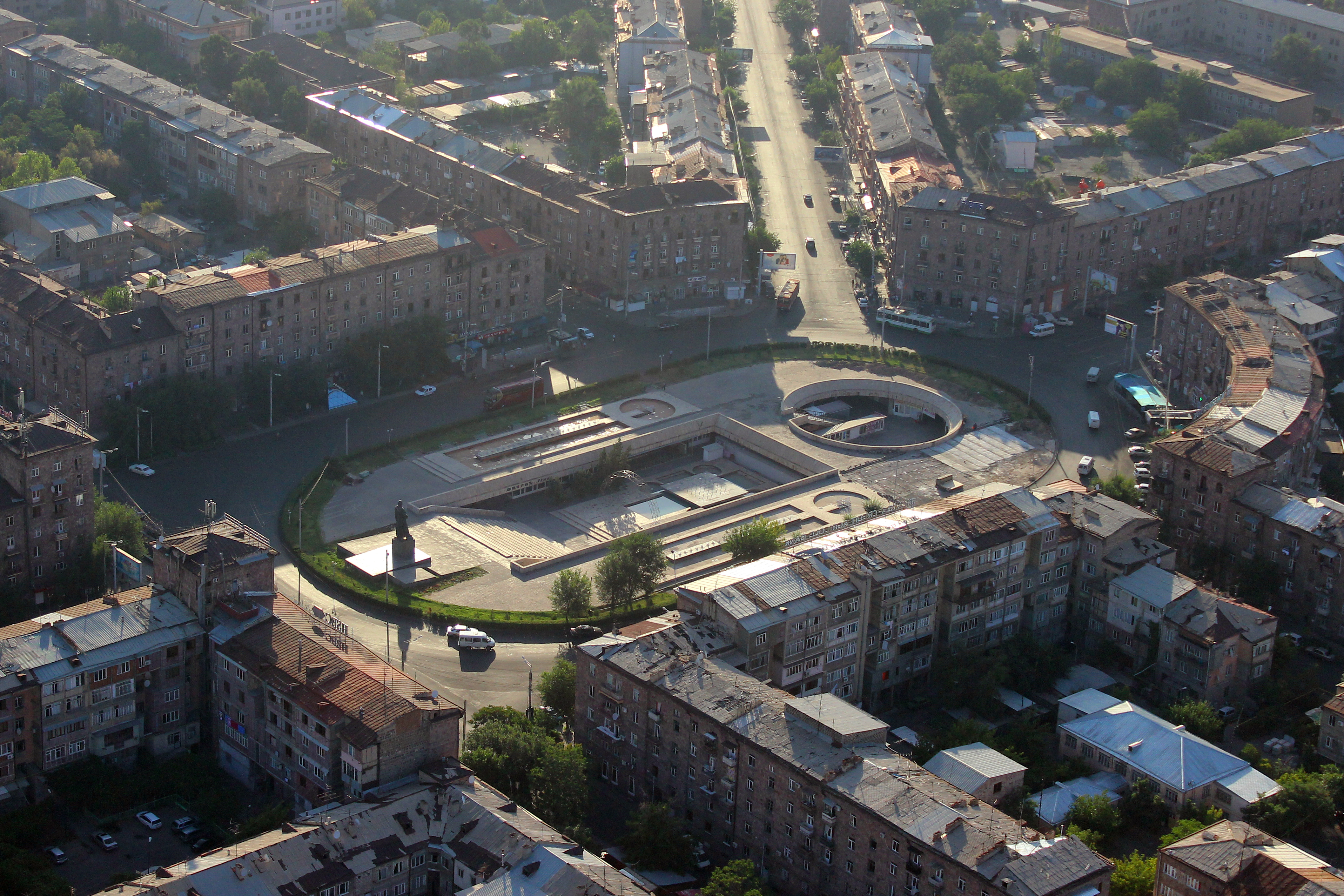 Գարեգին Նժդեհի հրապարակ